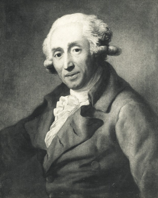 Portrait des Mediziners Ernst Platner.